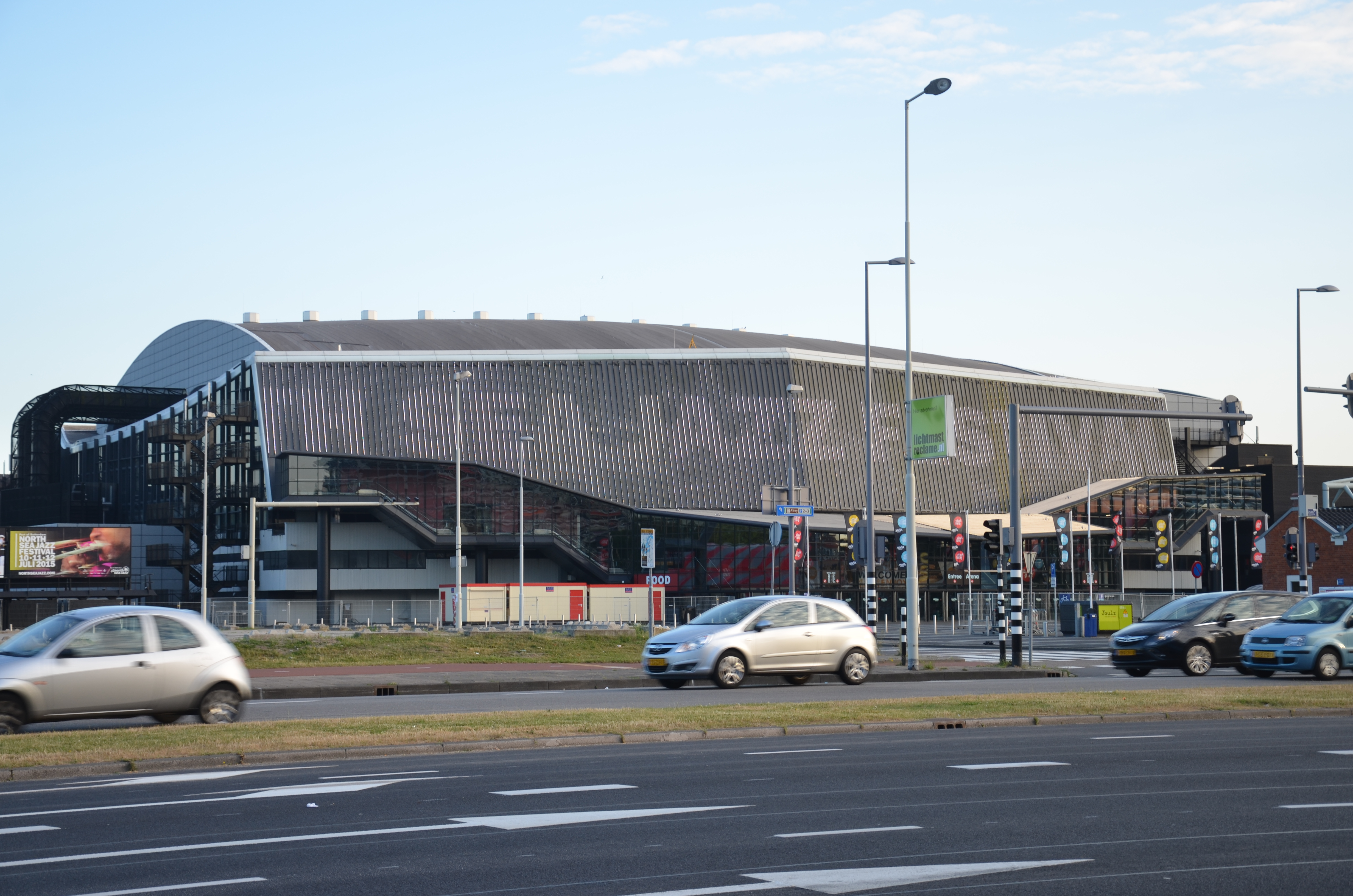 Ahoy Rotterdam anno 2015.